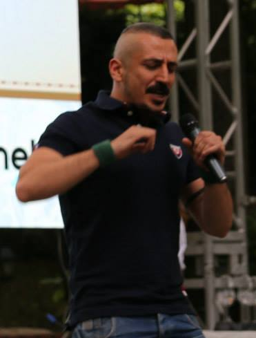 Onurr, 12. Radyo Boğaziçi Müzik Ödülleri'nde "Güm Güm" şarkısını seslendirirken.